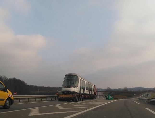 Nouvelle rame du tramway de Strasbourg en livraison sur la rocade d'Haguenau